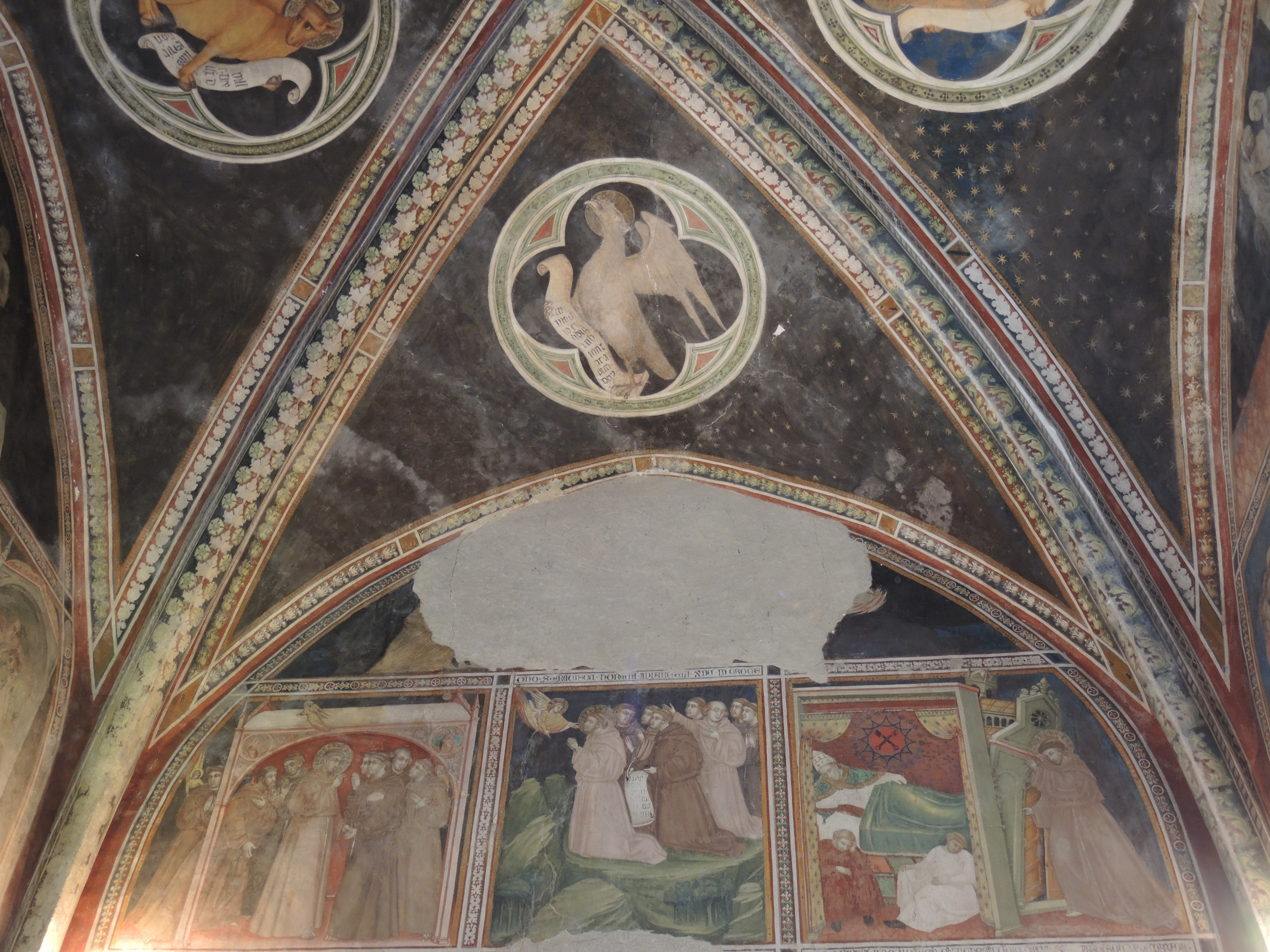 Castelvecchio Subequo: Chiesa di San Francesco